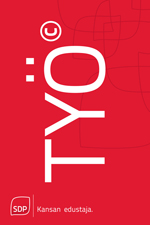 Eduskuntavaaleissa 2011 ja kunnallisvaaleissa 2012 käytetty juliste